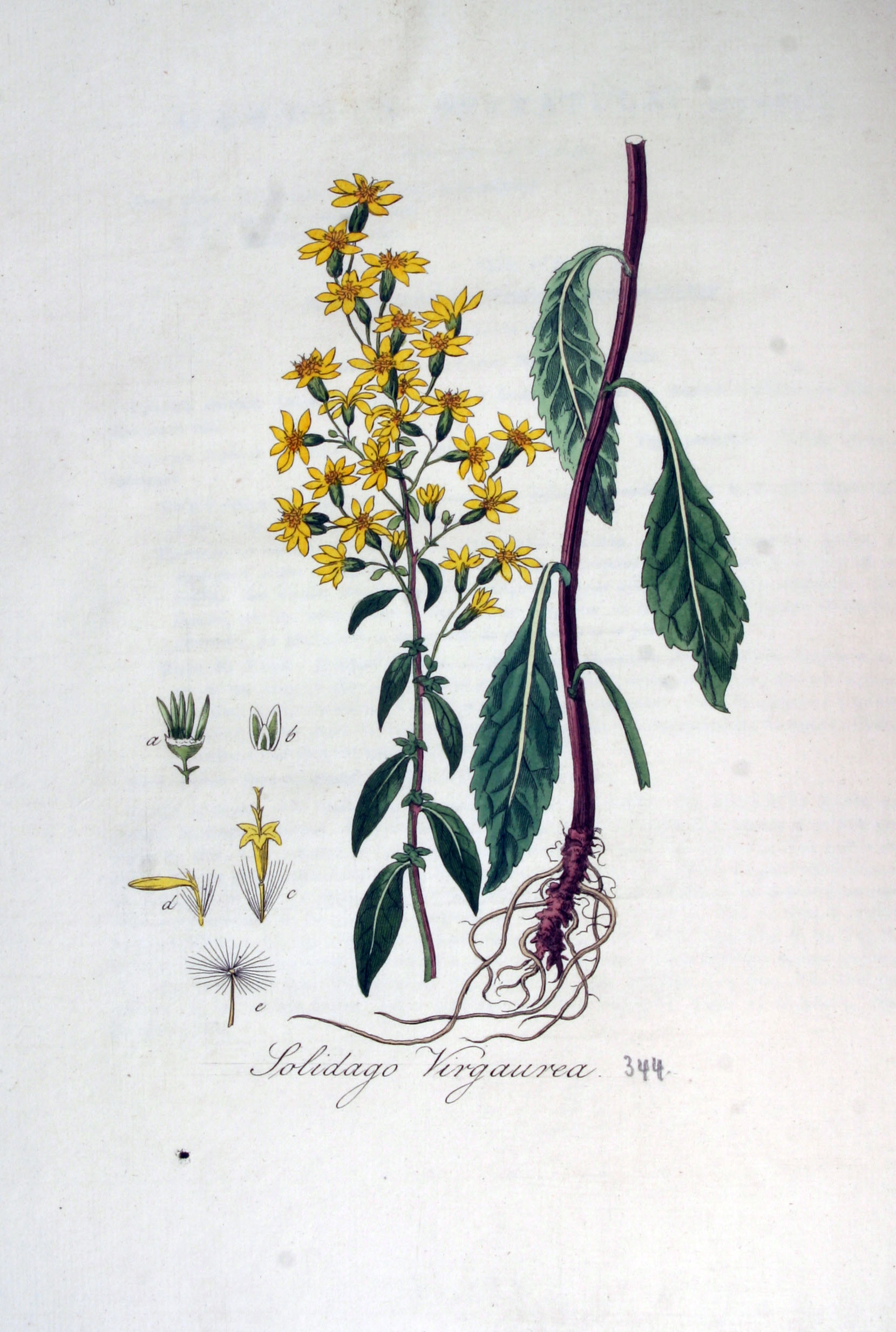 Solidago virgaurea L.